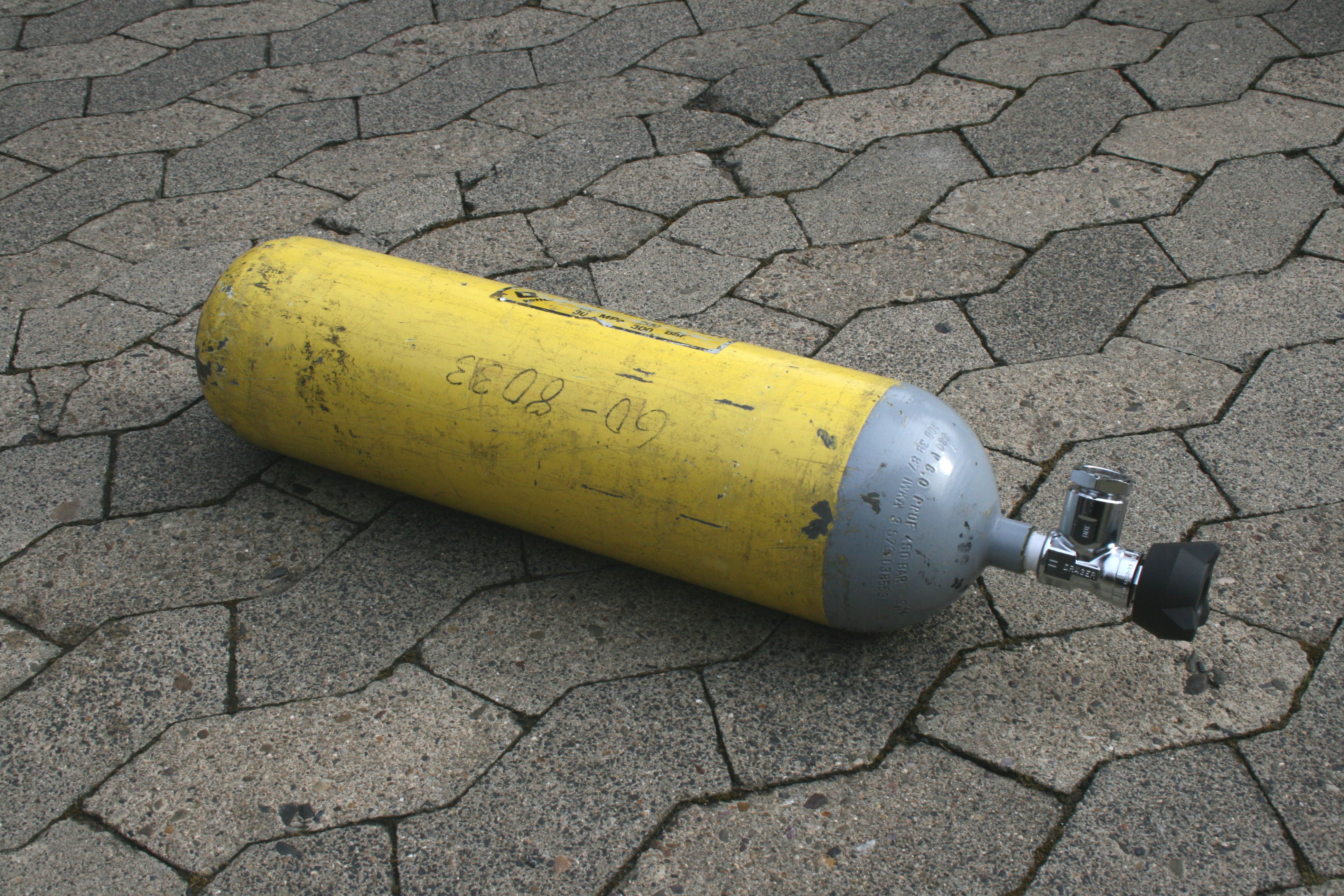 Atemluftflasche (300 Bar) der Feuerwehr mit veralteter Lackierung am Flaschenkopf (Alt: grau, neu: Schwarz-Weiß geviertelt). Ventil mit Blindstopfen verschlossen. Handrad in sicherer Form mit bedingtem Schutz gegen selbstständiges Schließen.